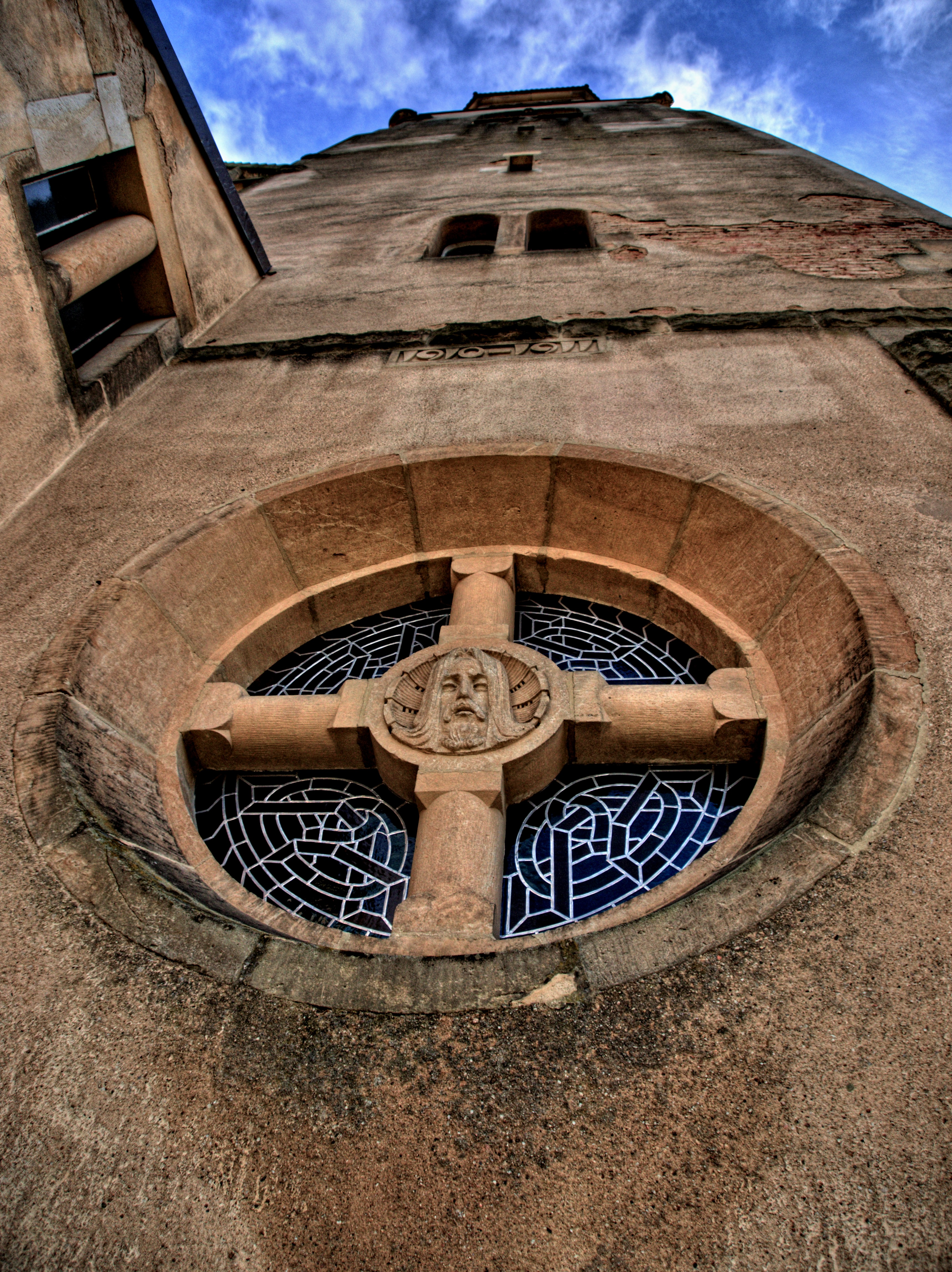 Kostel svatého Jana Nepomuckého